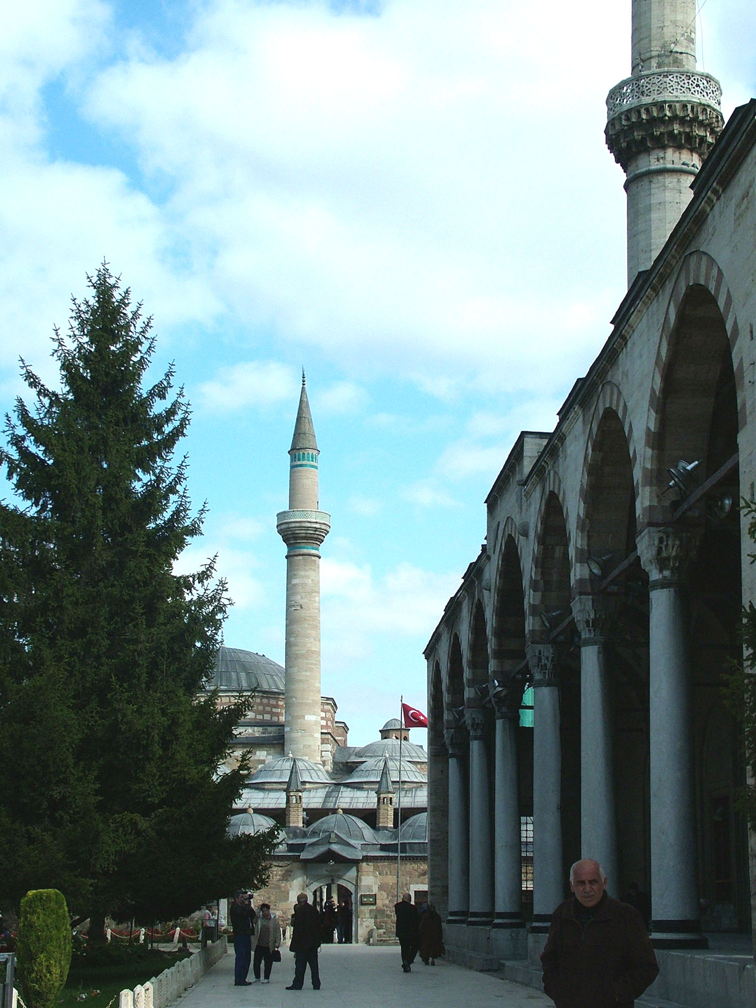 Szelimije-dzsámi (Konya, Törökország)